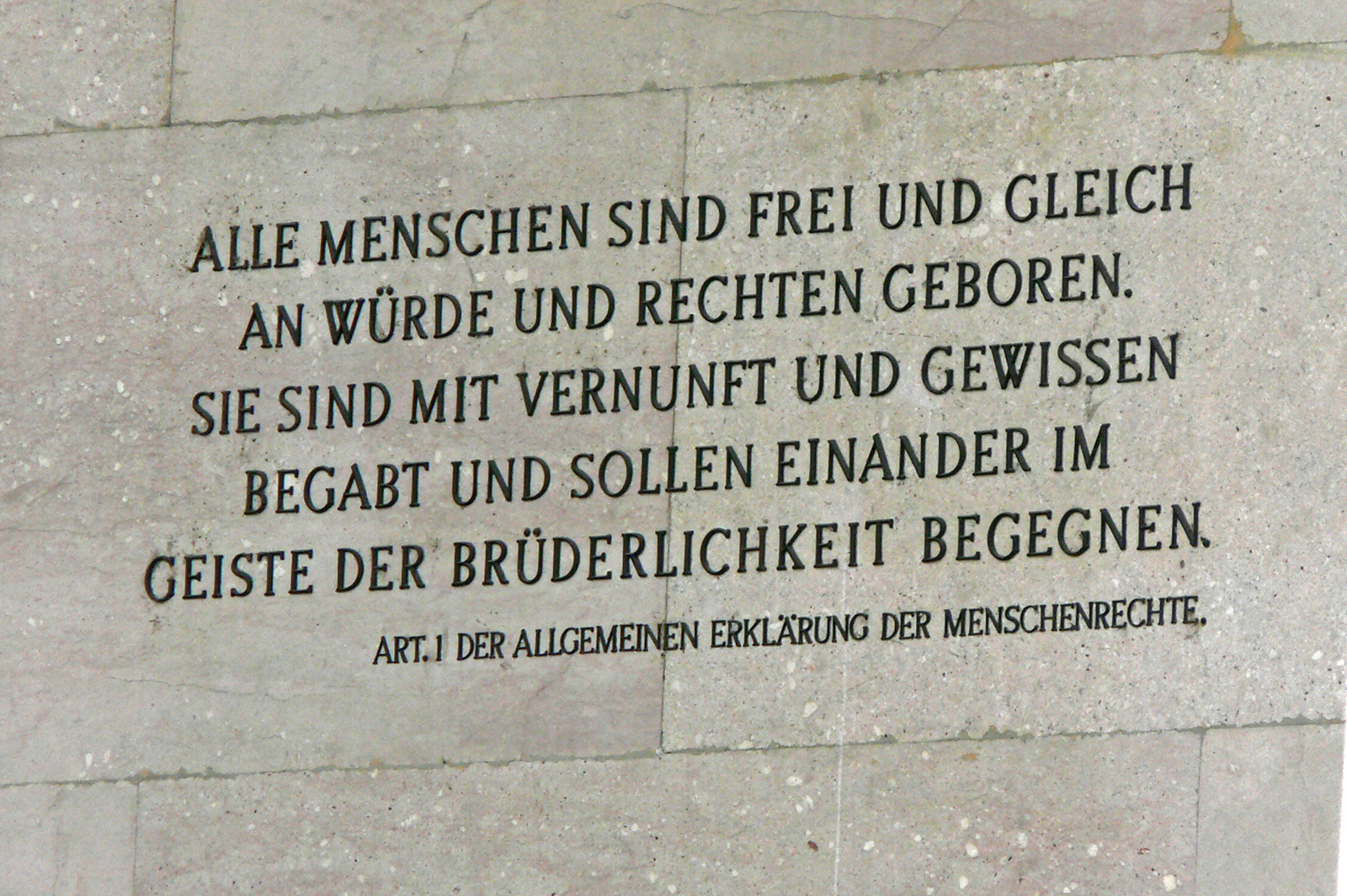 Parlamentsgebäude